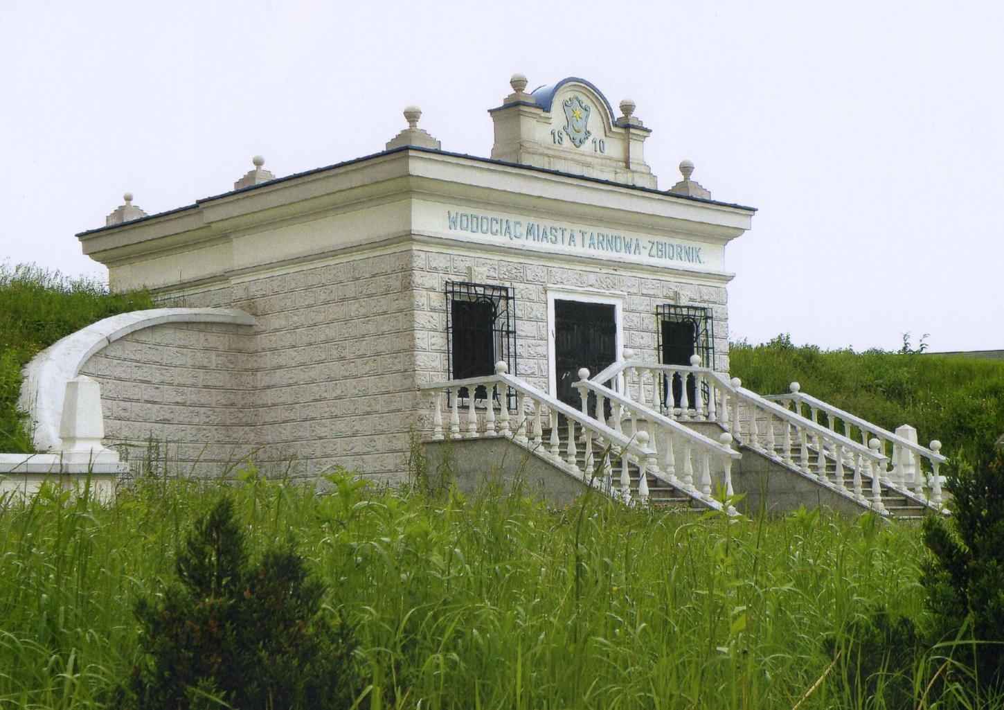 Tarnowski wodociąg. Budynek zbiornika wody (pochodzący z 1910 r.) położony w północnej części miasta.